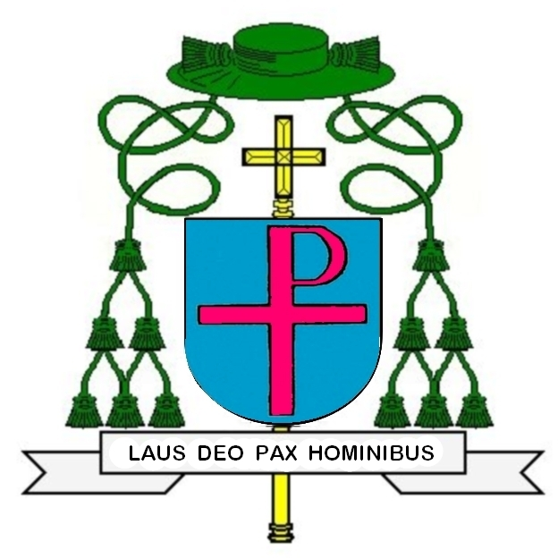 Wappen Tadeusz Józef Zawistowski, *1930, Titularbischof von Hospita, Weihbischof in Łomża (1973-2006)